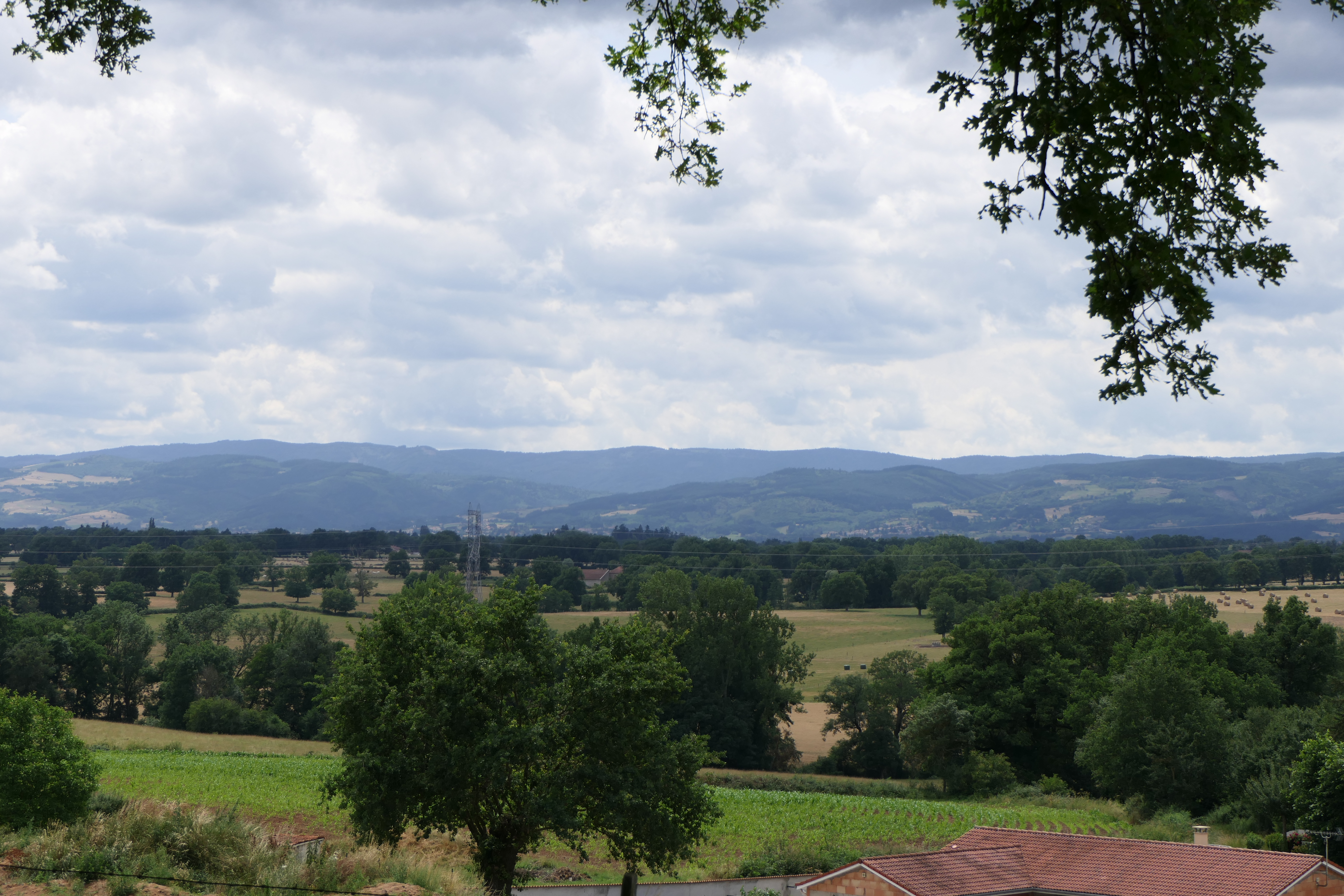 panaorama vu de l'église de Noailly